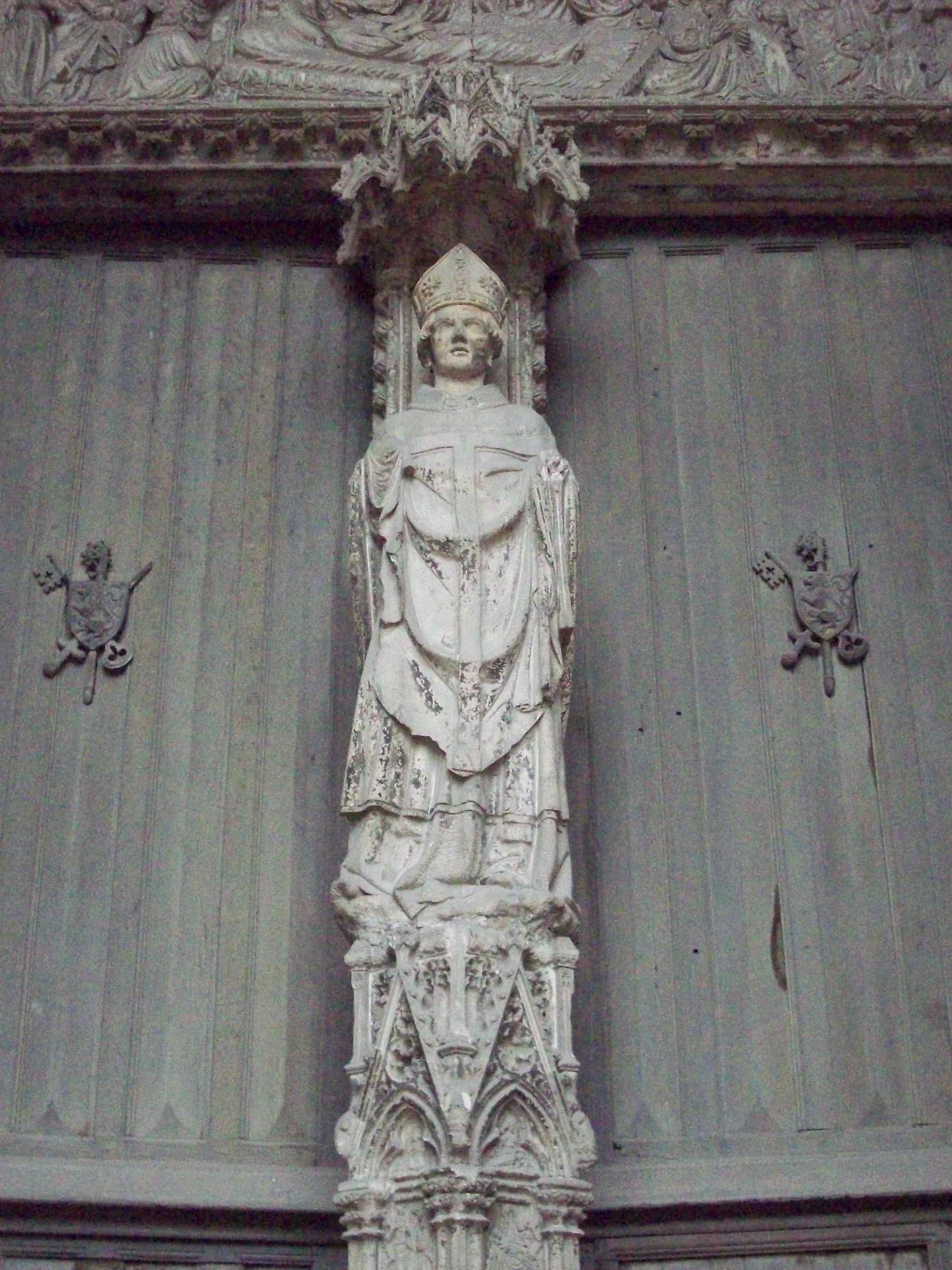 Saint Ouen du portail des Marmousets de l'abbatiale Saint Ouen à Rouen.